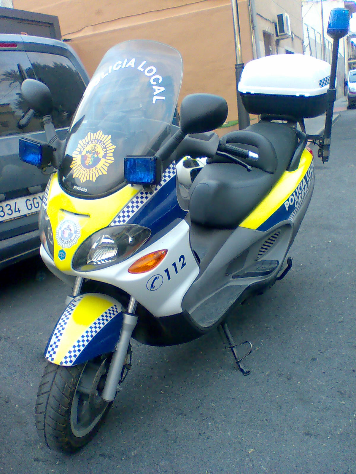 Motocicleta de la Policía Local de Orihuela.